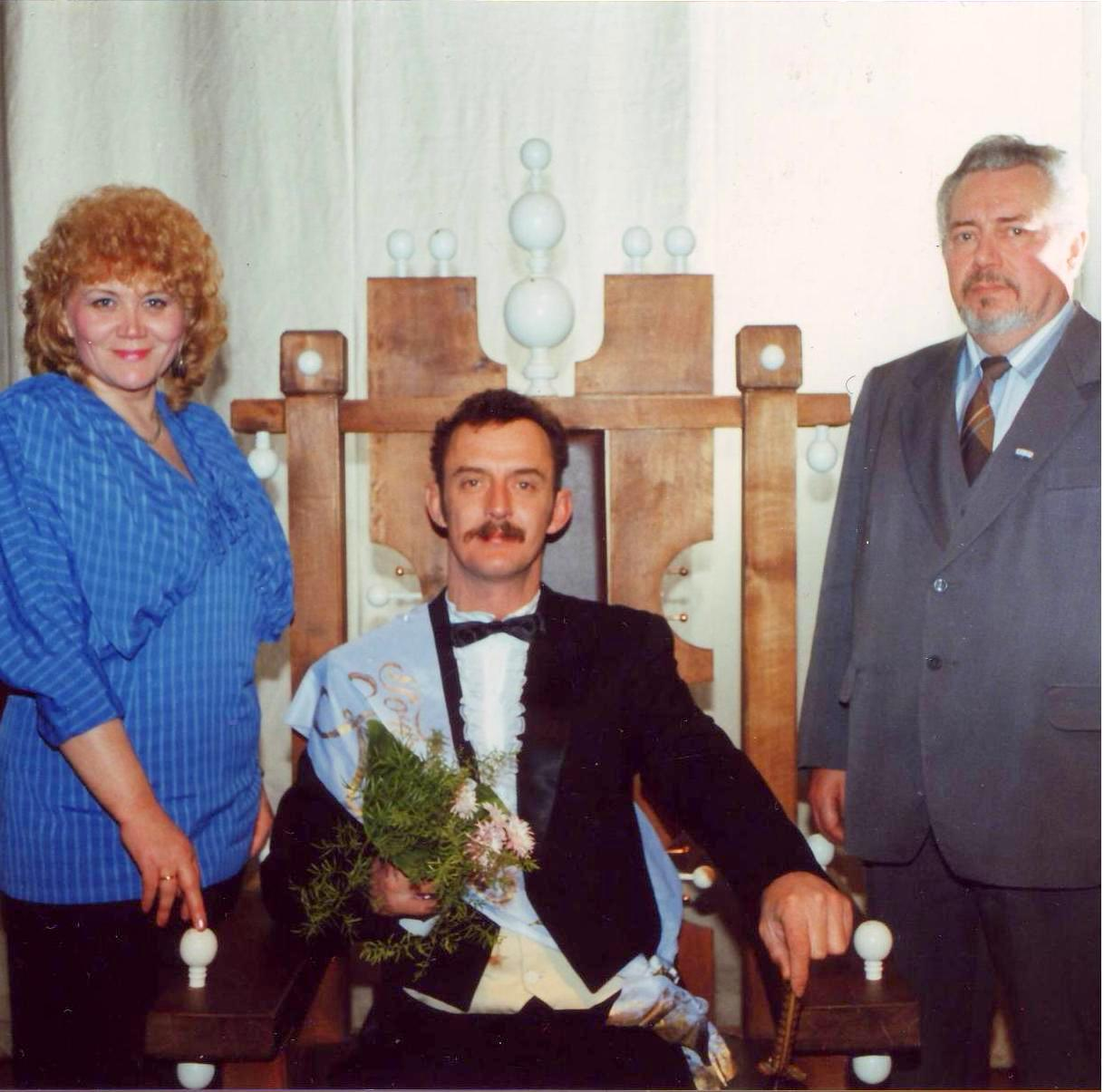 28.11.1992. Kirill I, õuedaam Lea Kuldsepp ja kuningriigi rajaja Leevi Häng